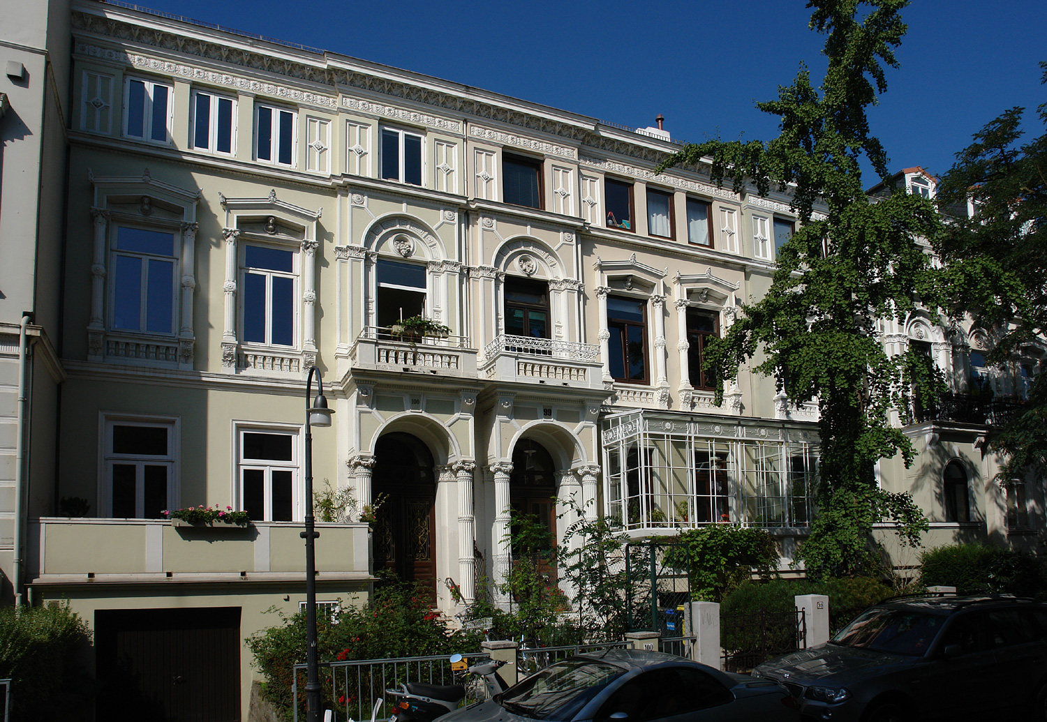 Bremer Haus in der Mathildenstraße 100+99 Das abgebildete Objekt ist ein geschütztes Kulturdenkmal in der Freien Hansestadt Bremen, mit der Nr. 0926 beim Landesamt für Denkmalpflege registriert. Das abgebildete Objekt ist ein geschütztes Kulturdenkmal in der Freien Hansestadt Bremen, mit der Nr. 0925 beim Landesamt für Denkmalpflege registriert.